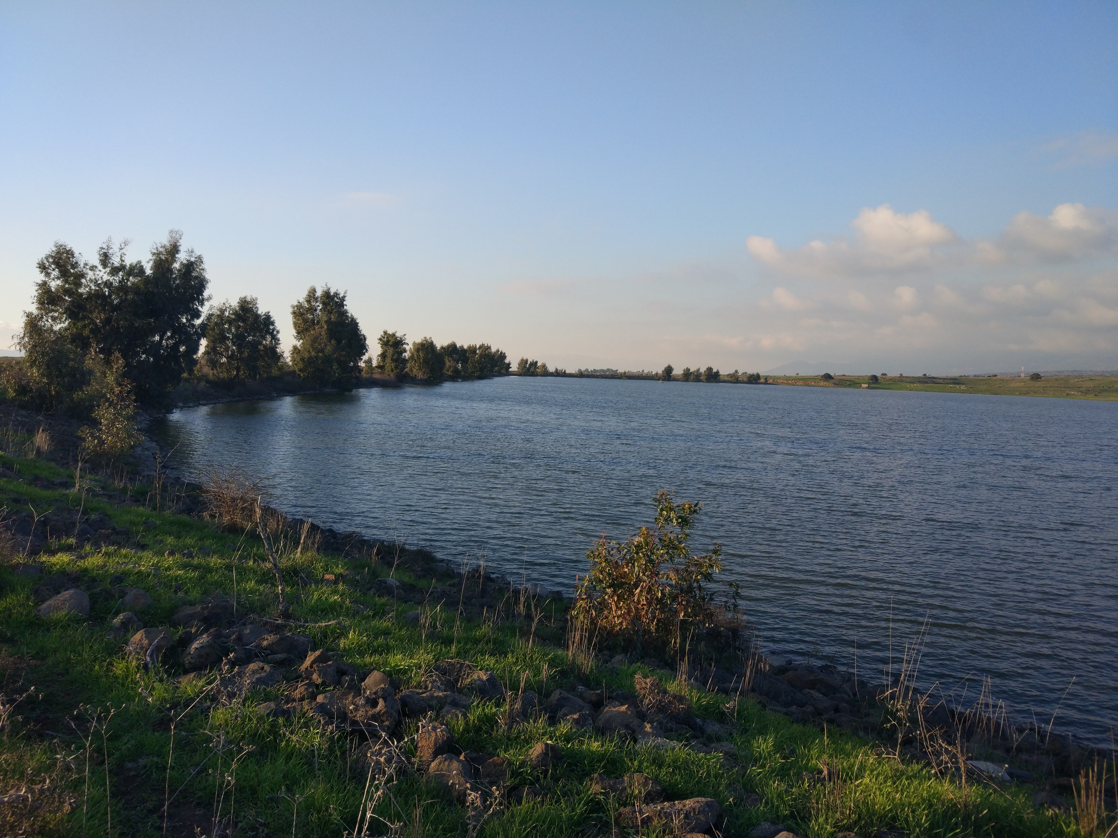 מאגר עורבים בינואר 2018